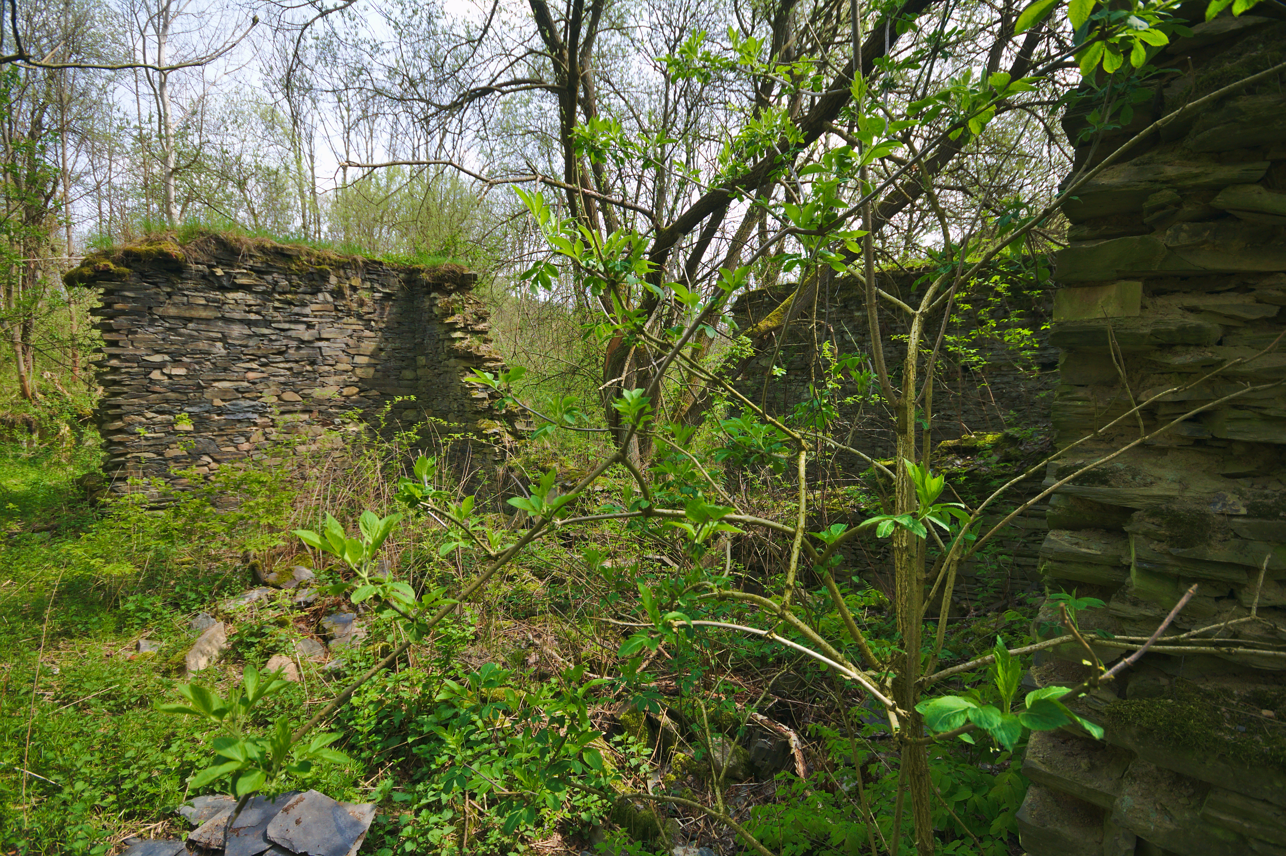 Zaniklá vesnice Bělá, katastr obce Heroltovice, Město Libavá, okres Olomouc